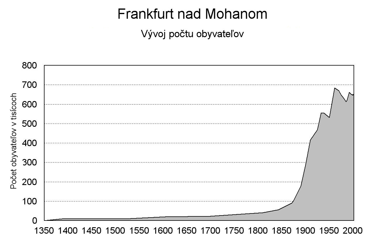 Prelozenie obrazku z nemeckej wiki sk::de:bild:Einwohnerentwicklung Frankfurt(M).jpg. Autor: Steffen Mokosch Preklad: Maros Povodne data: 09:07, 21. Aug 2004 . . Steffen M. (91205 Byte) (Einwohnerentwicklung von Frankfurt am Main) Einwohnerentwicklung von Frankfurt am Main Kategória:Obrázky schém